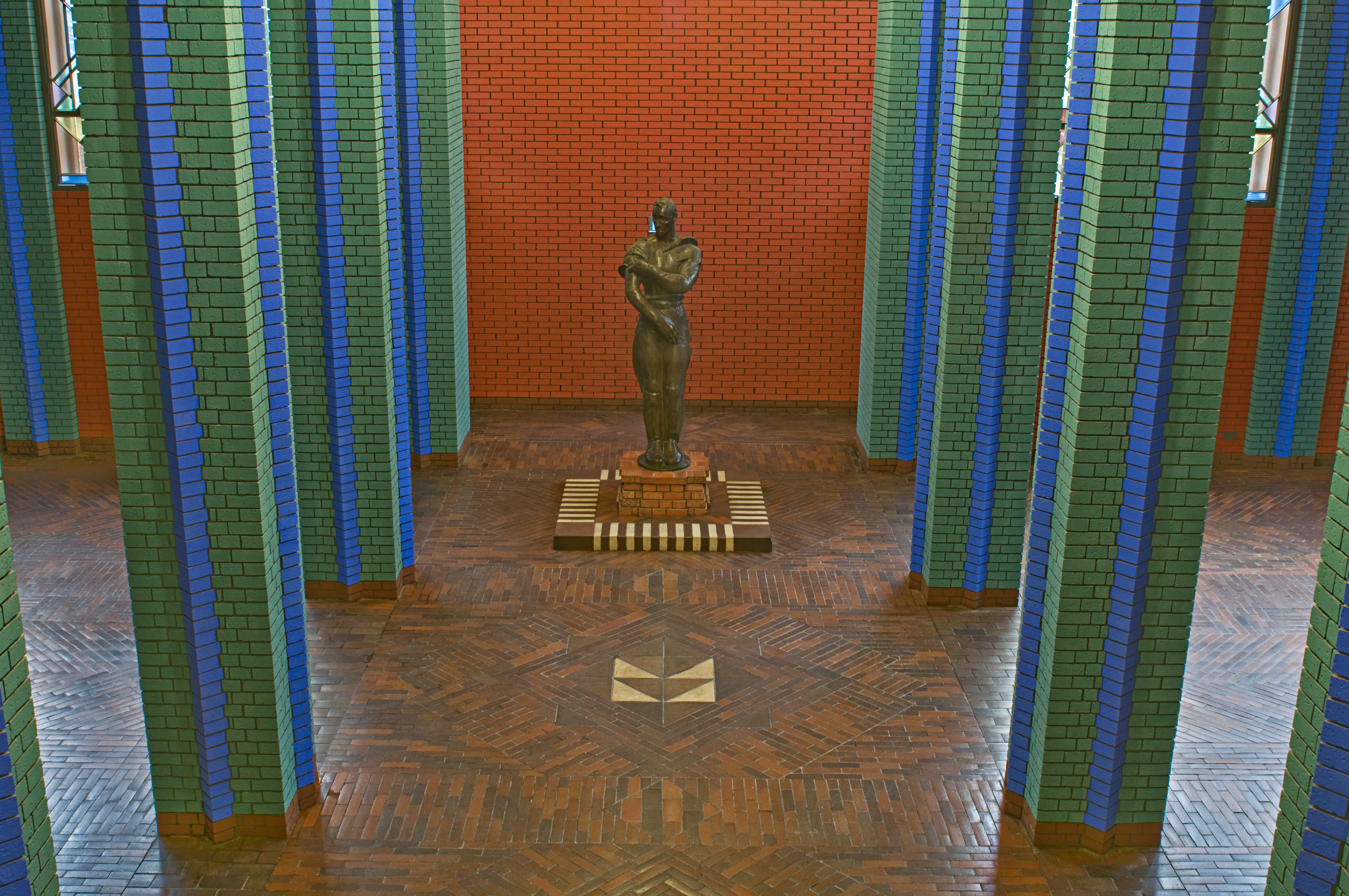 Industriepark HöchstBehrensbau: Ausstellungsraum mit Arbeiterstatue von Richard Scheibe